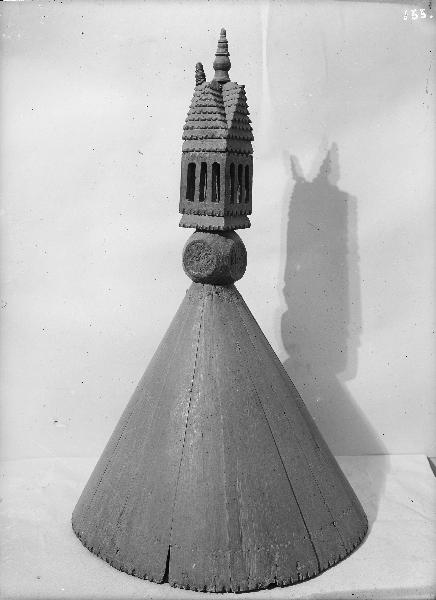 Dopfuntslock. Daterat 1645. Locket är koniskt, grönmålat och med ett litet hus på toppen. Kategori: (02) InteriörerDopfuntslock. Daterat 1645. Locket är koniskt, grönmålat och med ett litet hus på toppen.